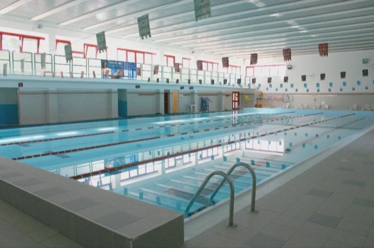 Piscina di Sturno